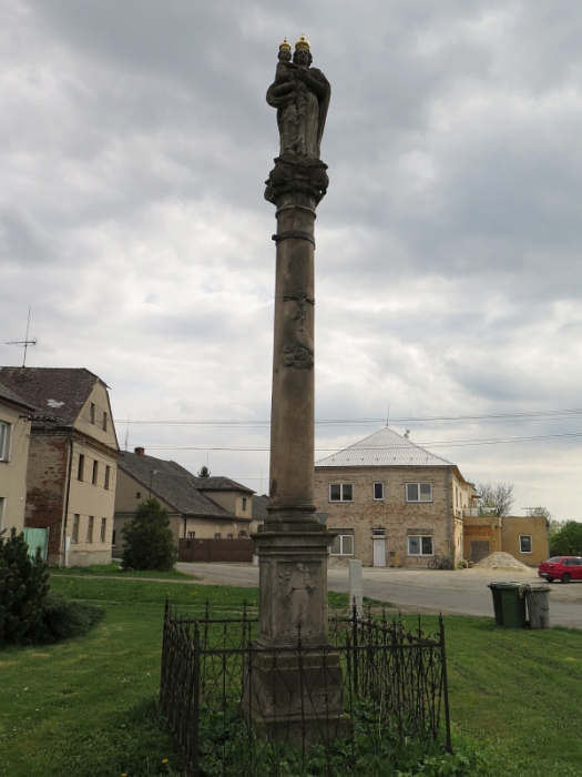 Sloup se sochou P. Marie (Dolní Sukolom), náves, při čp. 1065, Dolní Sukolom, Dolní Sukolom.